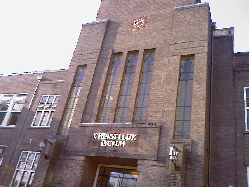 Voorkant Eerst Christelijk Lyceum